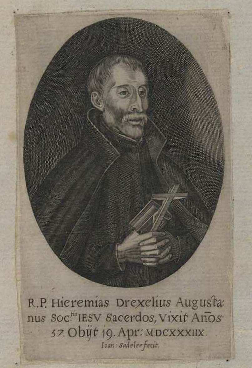 Jeremías Drexel, estampa a buril firmada Ioan Sadeler fecit. Inscripción latina: R. P. Hieremias Drexelius Augusta:/nus Soc.tis IESV Sacerdos, Vixit Años / 57 Obiit 19 Apr. : MDCXXXIIX.